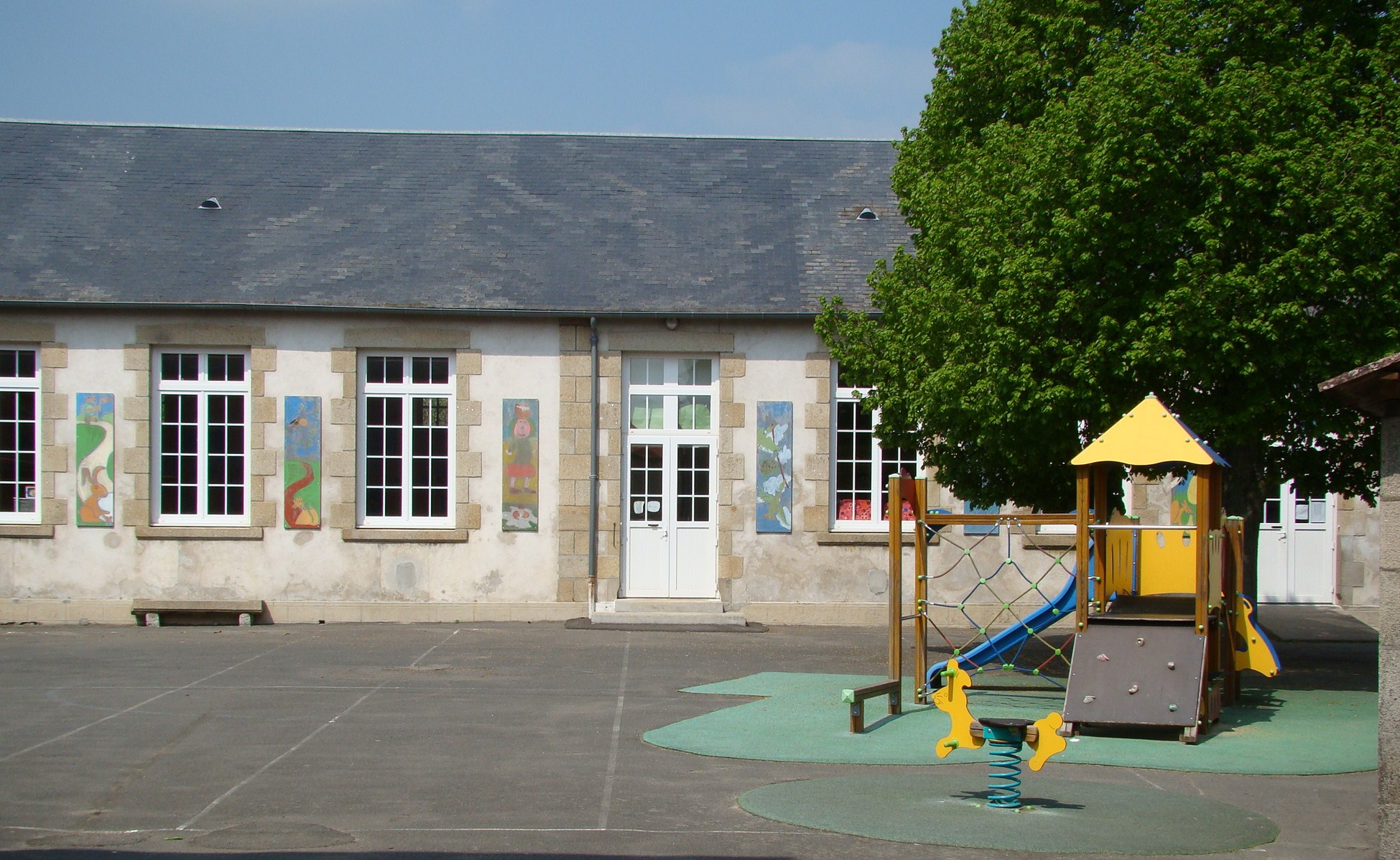 Ecole publique de Noirterre